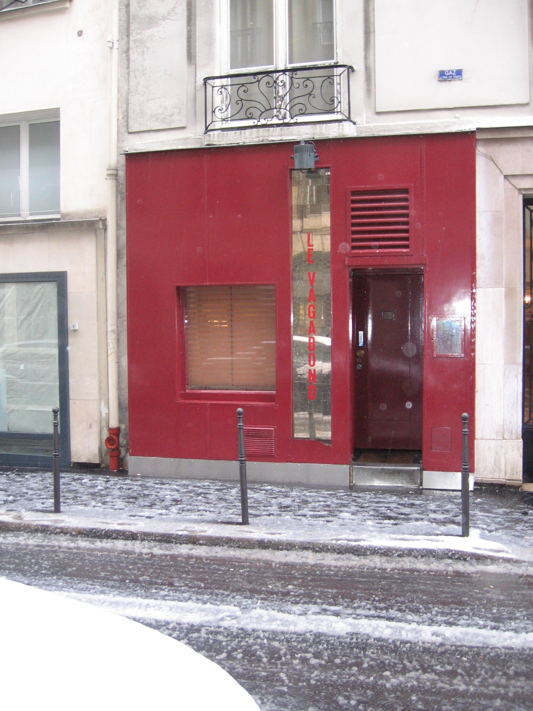 Le Vagabond est un bar restaurant gay situé 14 rue Thérèse 75001 Paris. L’établissement a été fondé en 1956, époque où le quartier de la rue Sainte-Anne était un centre de la vie homosexuelle parisienne. Son architecture est représentative de l’époque : porte dans un renfoncement et comportant un judas, ouverture restreinte sur l’extérieur. Ce bar a été cité dans le roman de Jean-Noël Pancrazi « Les quartiers d’hiver » en 1990.